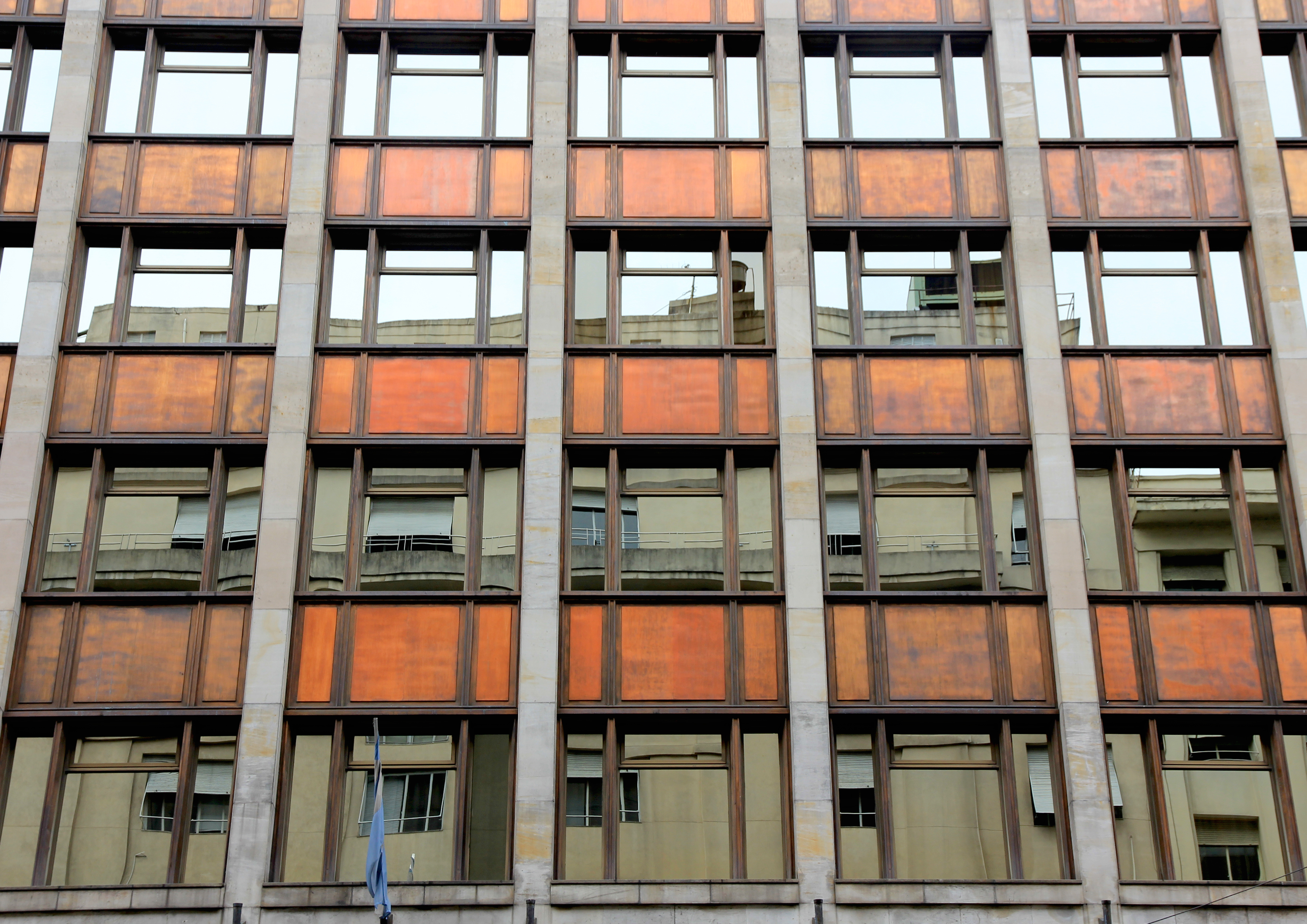 El color del Tiempo